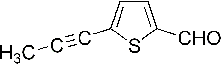 формула|daedelia juniperina